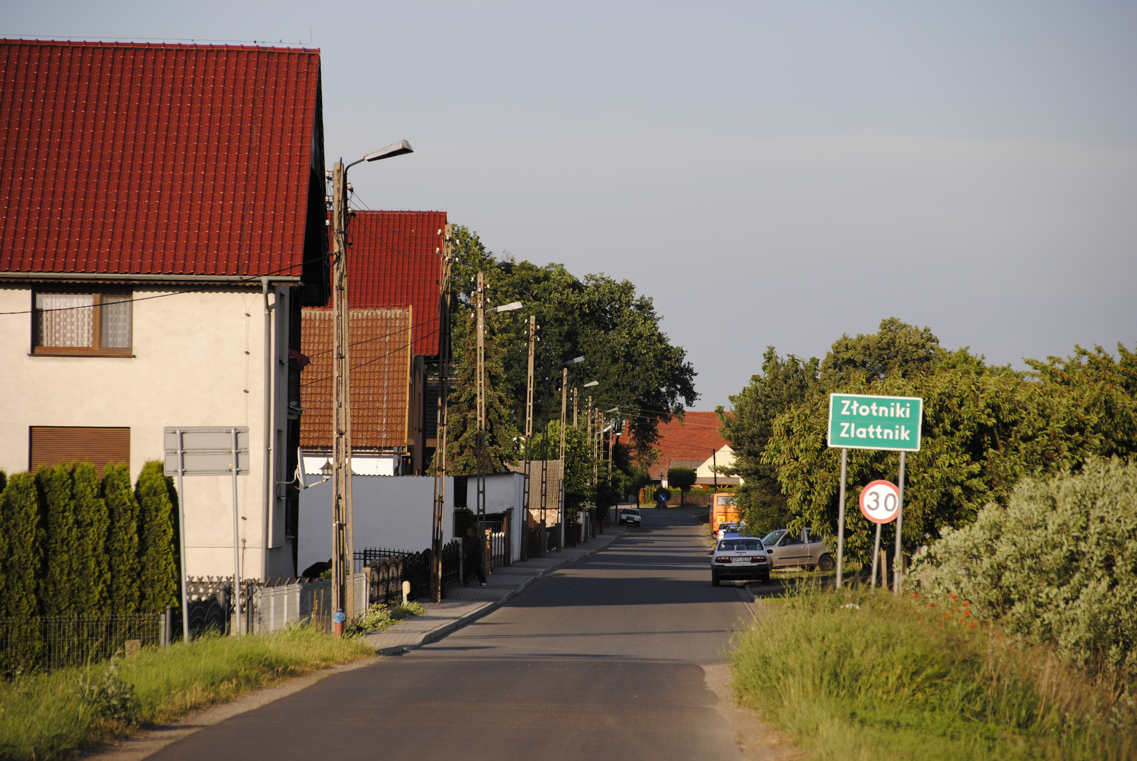 ul Parkowa in Zlattnik Kreis Oppeln